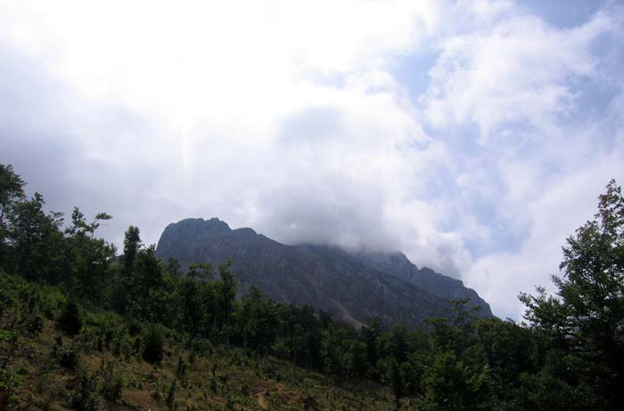 Komovi u magli